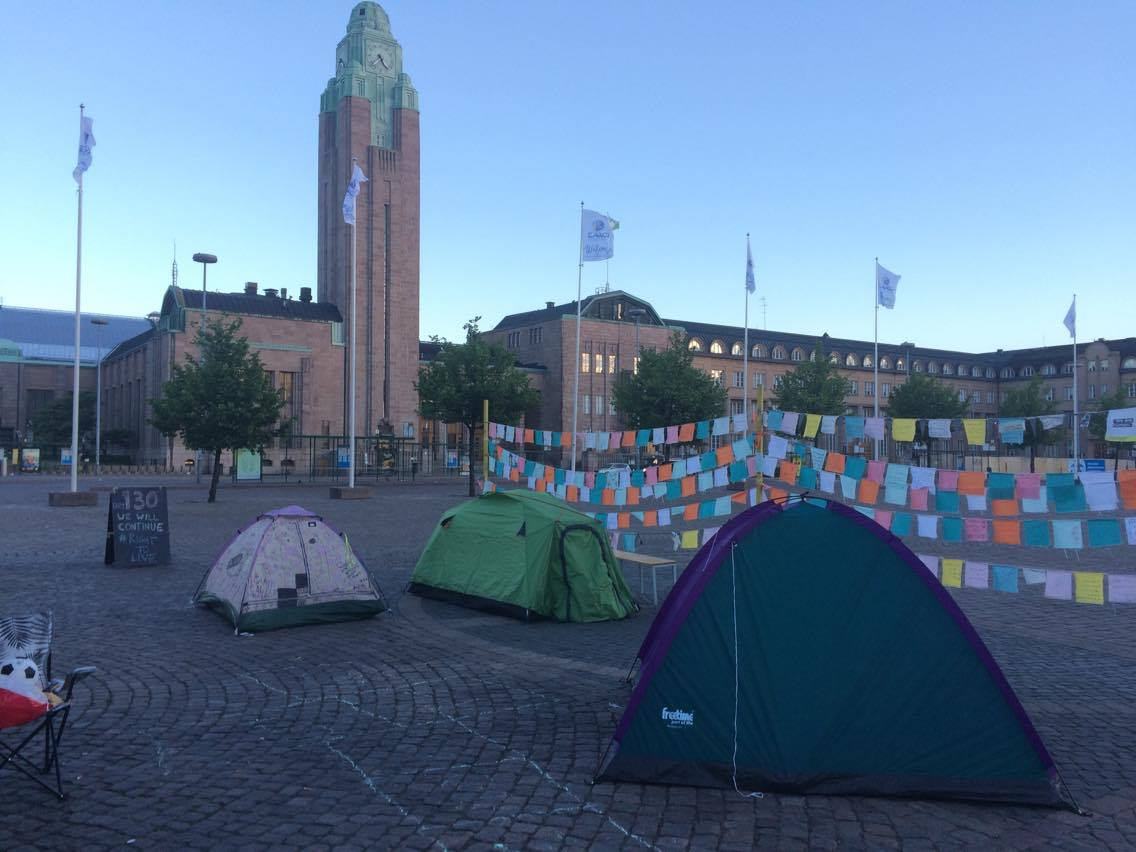 Turvapaikanhakijoiden mielenosoituksessa Helsingin Rautatientorilla järjestetty Tenting in Solitarity teltta installaatio maailman pakolaispäivänä 20-21.6.2017